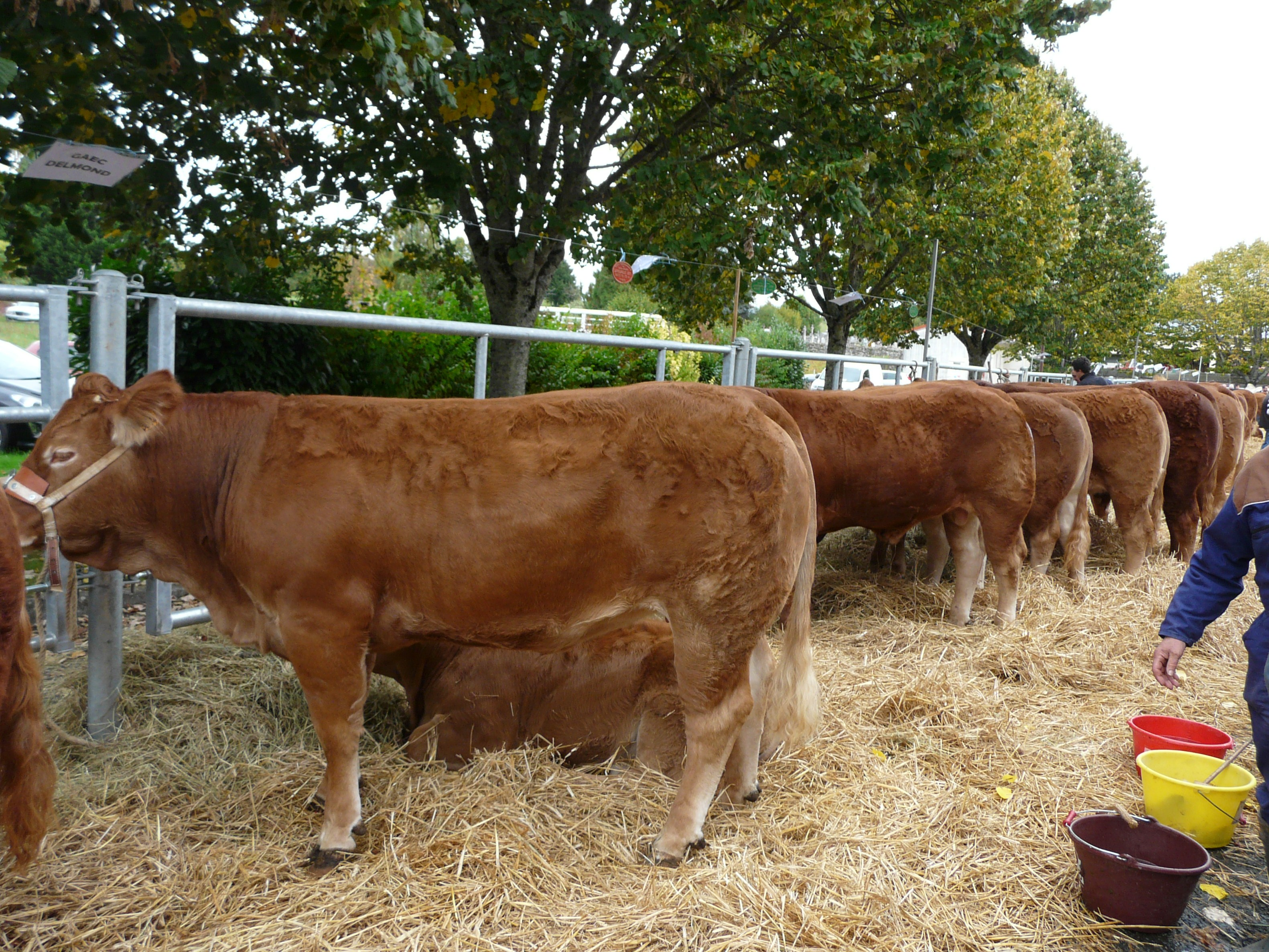 Bétail de race limousine, comice agricole de Lanouaille, Dordogne, France.